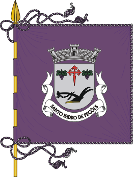 Santo Isidro Wappen